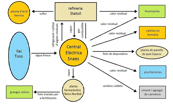 Esquema ecologia industrial, exemple de Kalundborg.